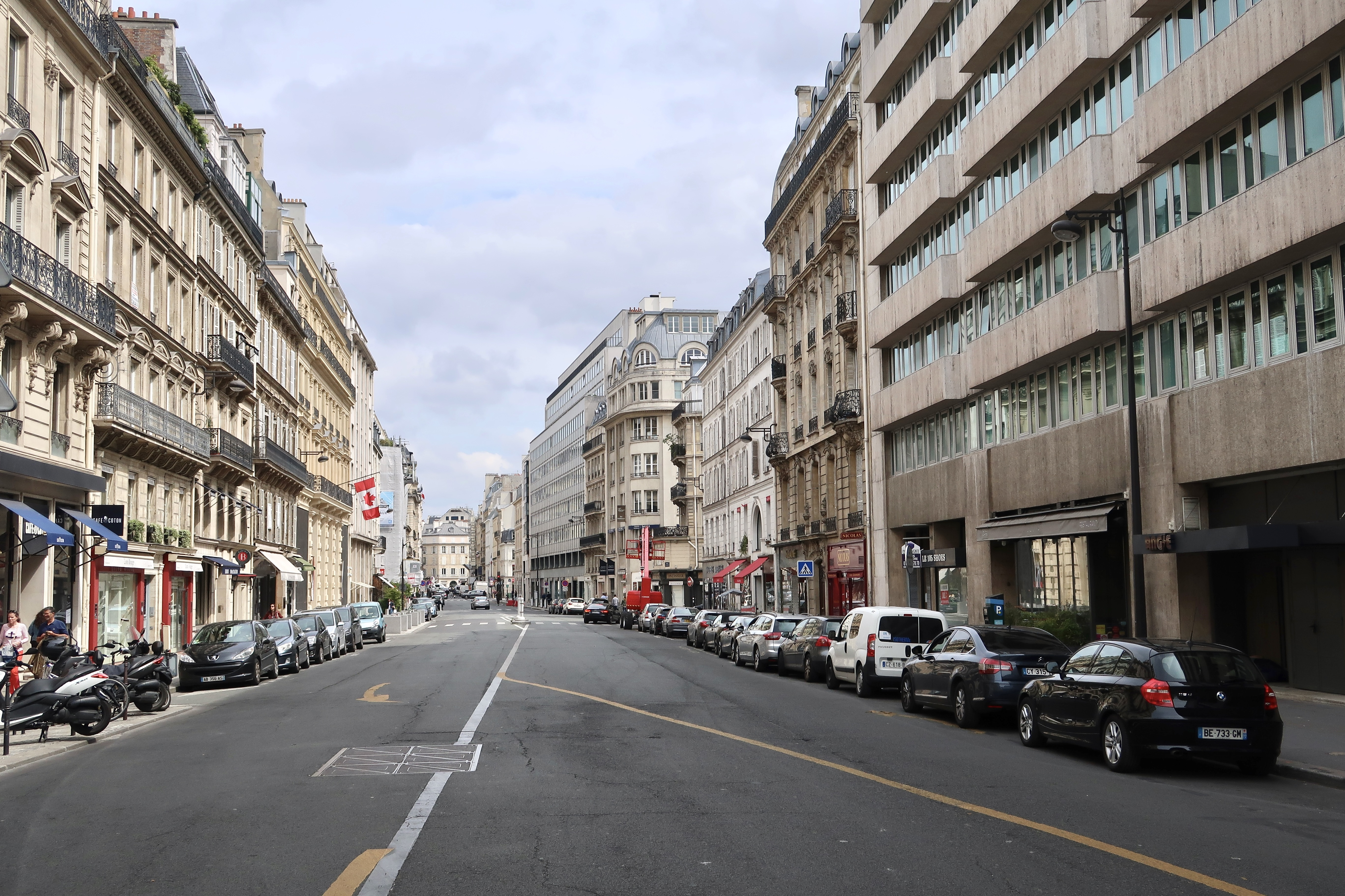 Rue du Faubourg-Saint-Honoré (Paris, 8e).